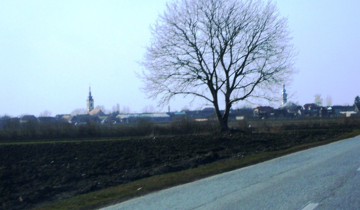 Бачинци